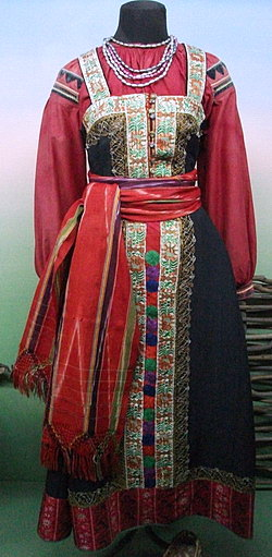 Праздничный костюм однодворки, Луганский краеведческий музей